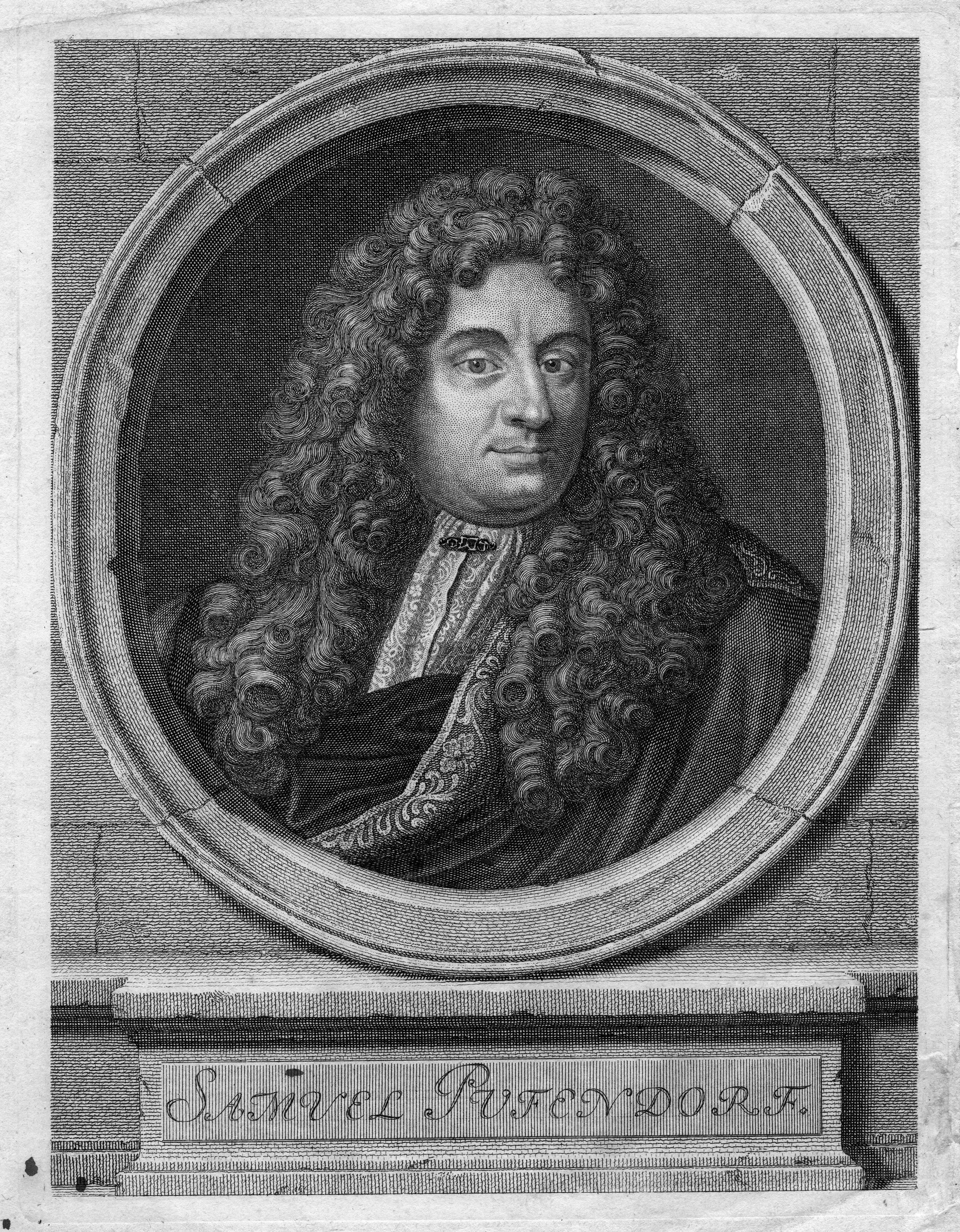 portrait gravé